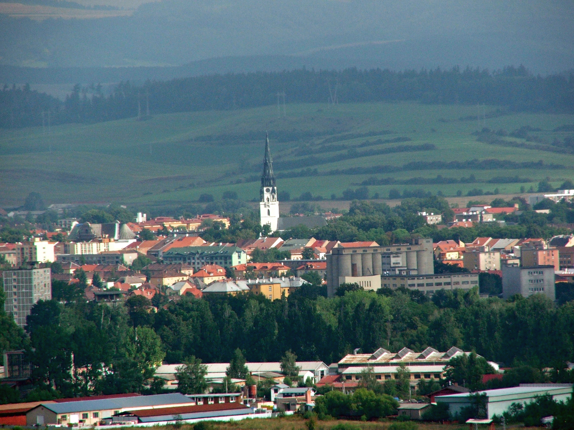 Spišská Nová Ves city's panorama